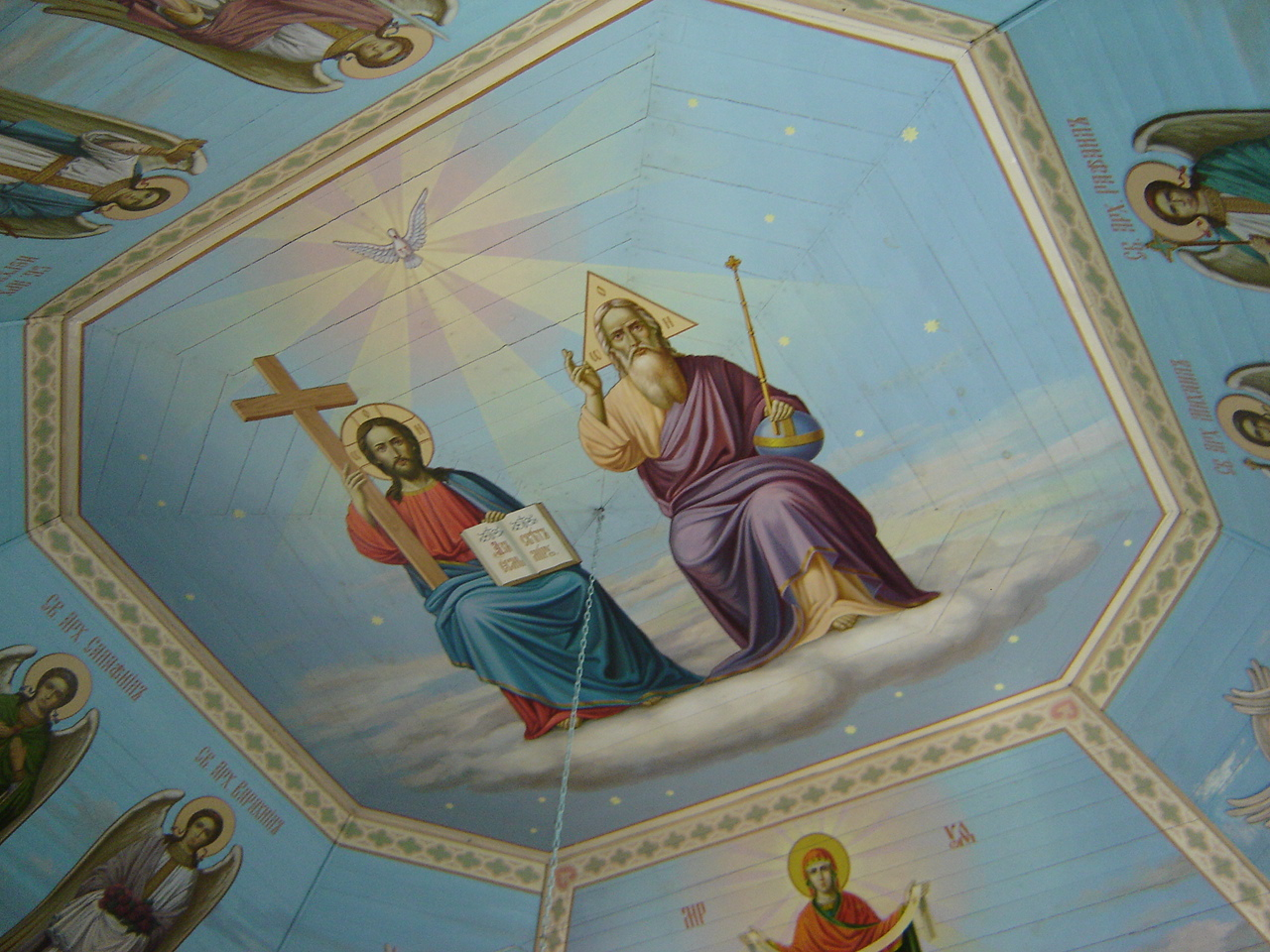 Cerkiew w Malinnikach.